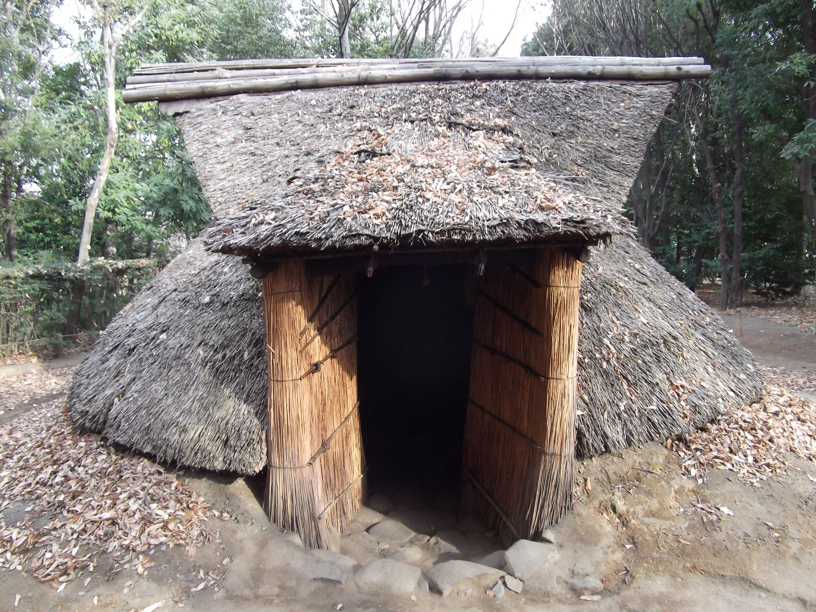 遺跡庭園「縄文の村」（東京都多摩市）の復元住居